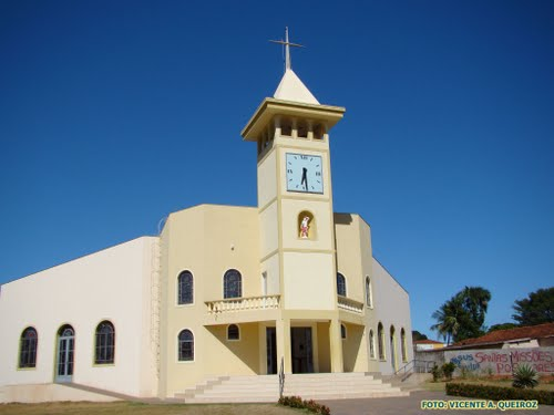 Matriz São Sebatião